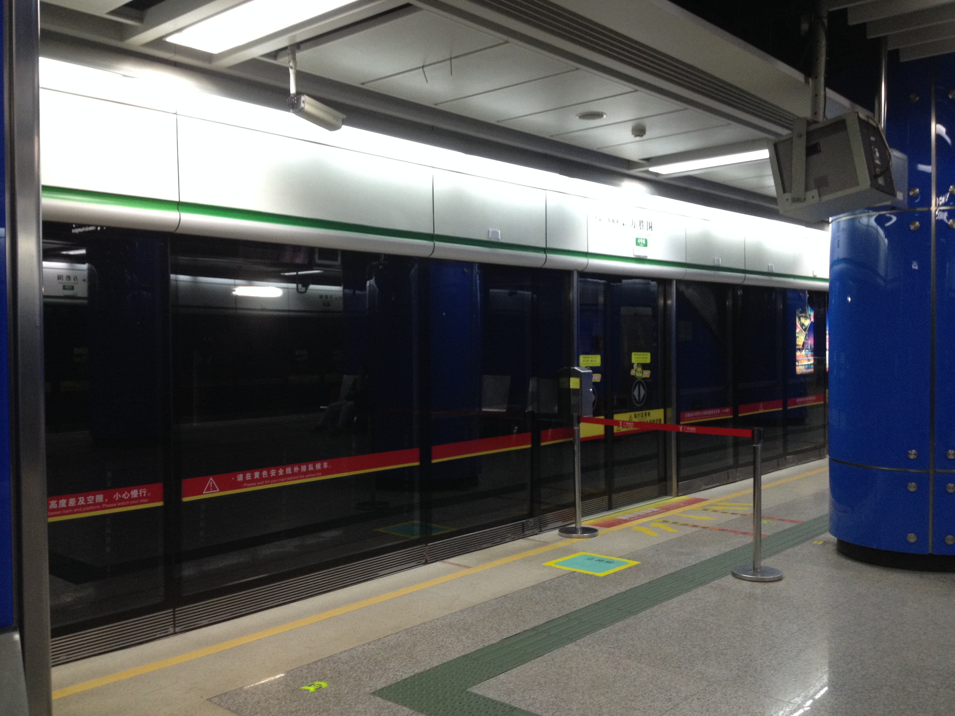 广州地铁4号线万胜围站月台一端